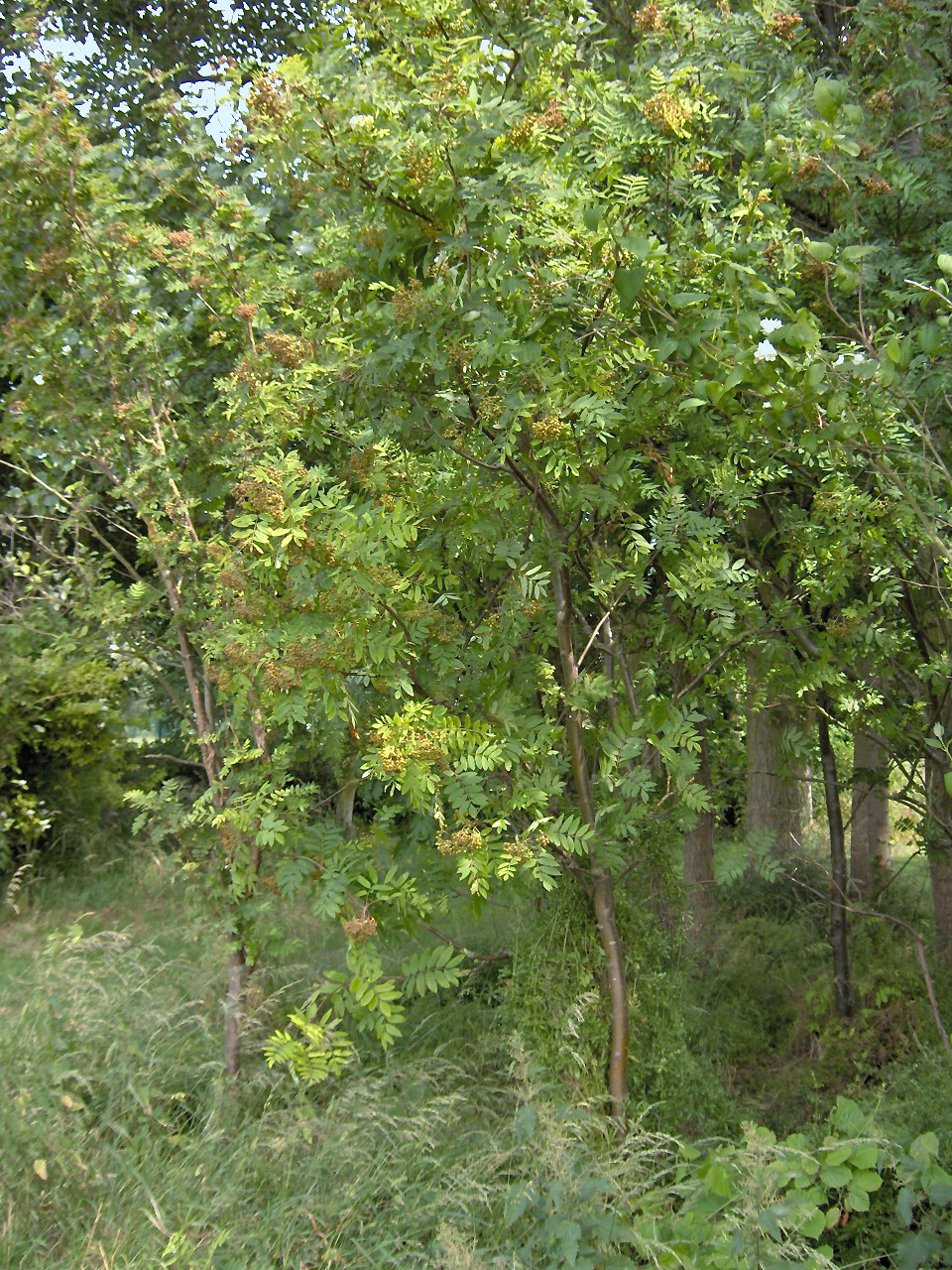 Species Sorbus aucuparia Family Rosaceae